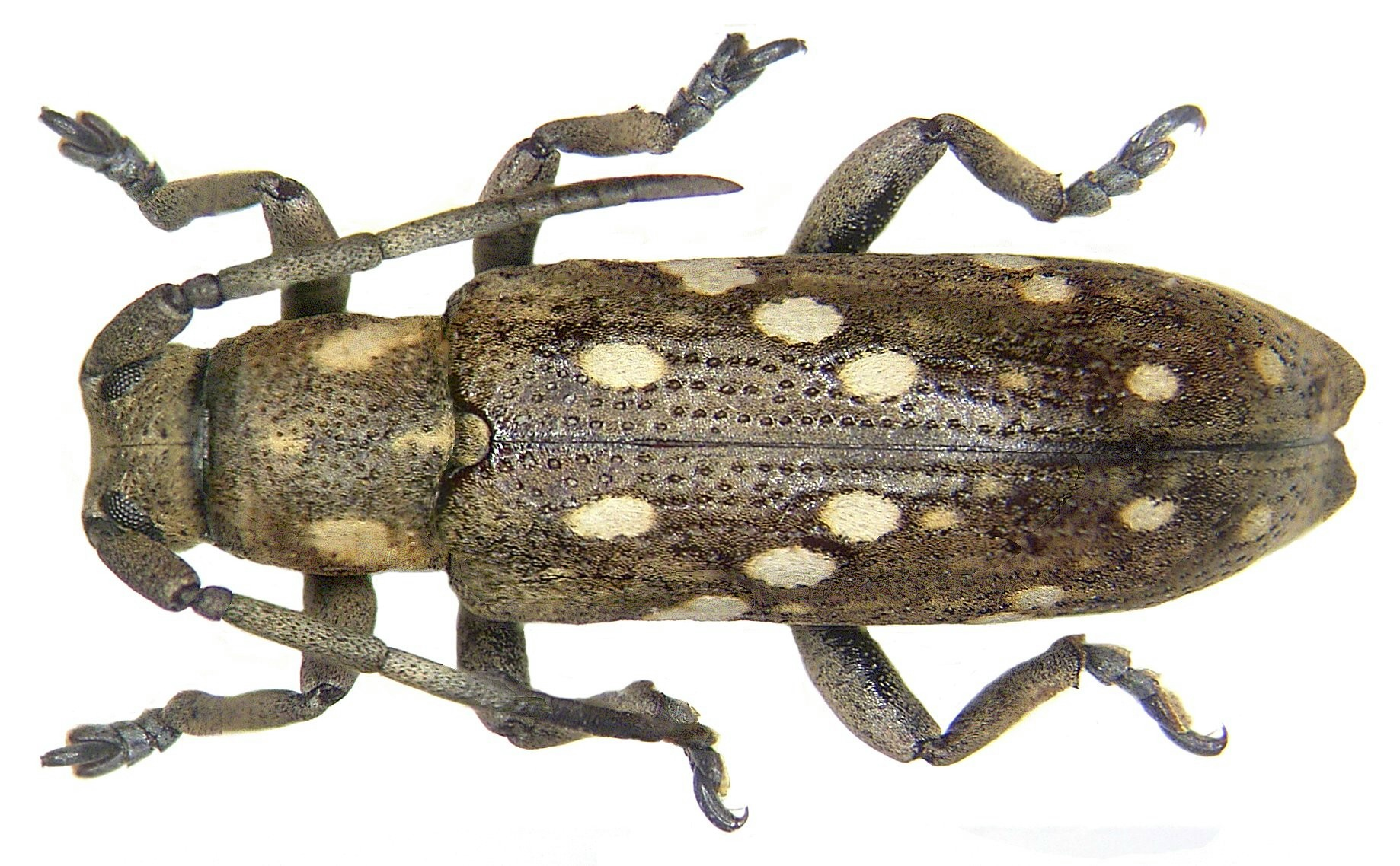 Familie: Cerambycidae Groesse: 11,5 mm Fundort: Indonesien, Irian Jaya, Salawati Isl., Kalobo leg. A.Skale, 2004; det. A.Weigel Photo: U.Schmidt, 2007